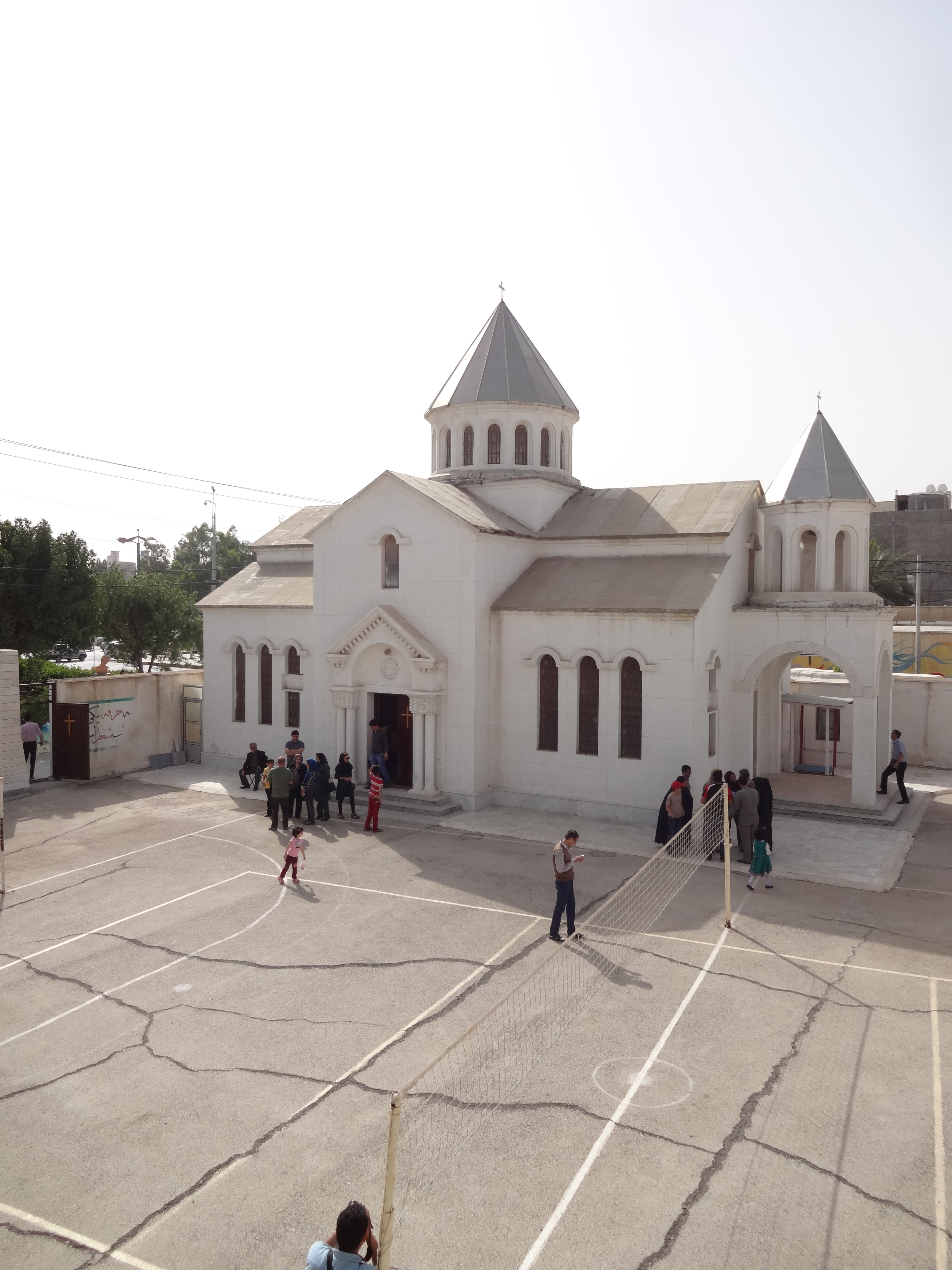 کلیسای ارامنه آبادان